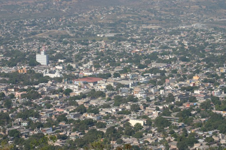 Vista Panoramica de la Ciudad de Iguala de la Independenciatomada desde el Asta Bandera, Cerro el Tehuehue.